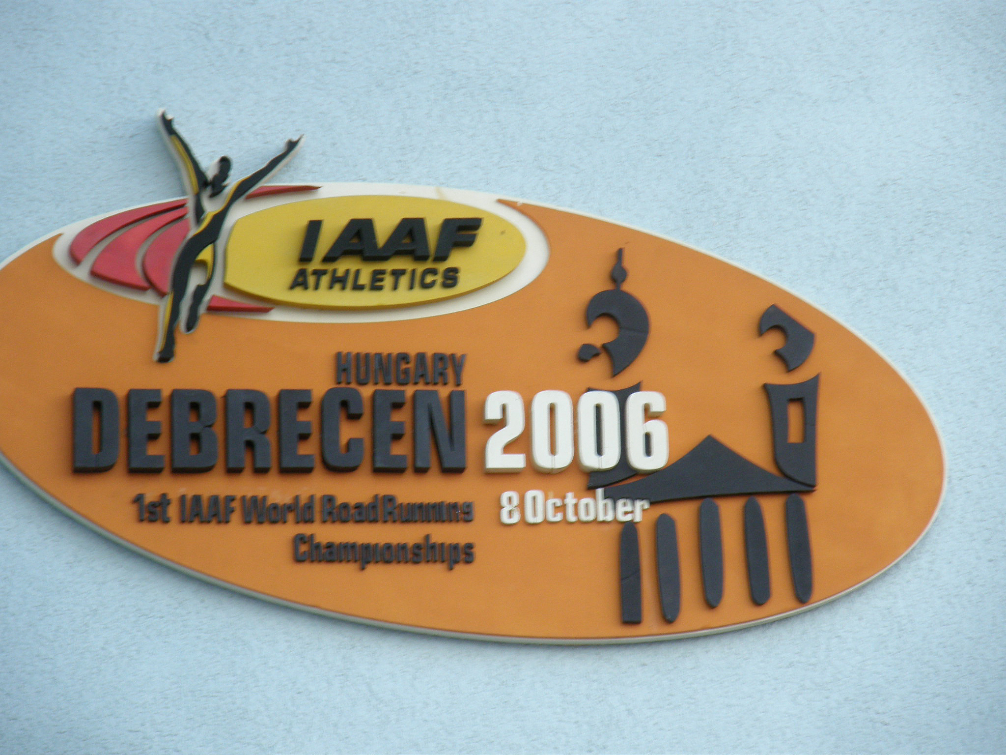 Logo mistrzostw świata w biegach ulicznych - Debreczyn 2006.